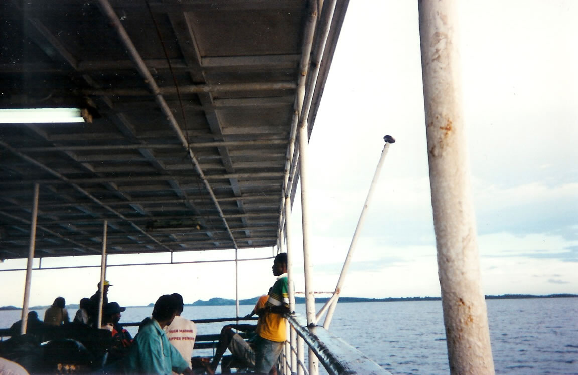 Description : A bord du ferry entre Viti Levu et Ovalau, îles Fdiji (Avril 1994). Auteur : Laurent Nevers